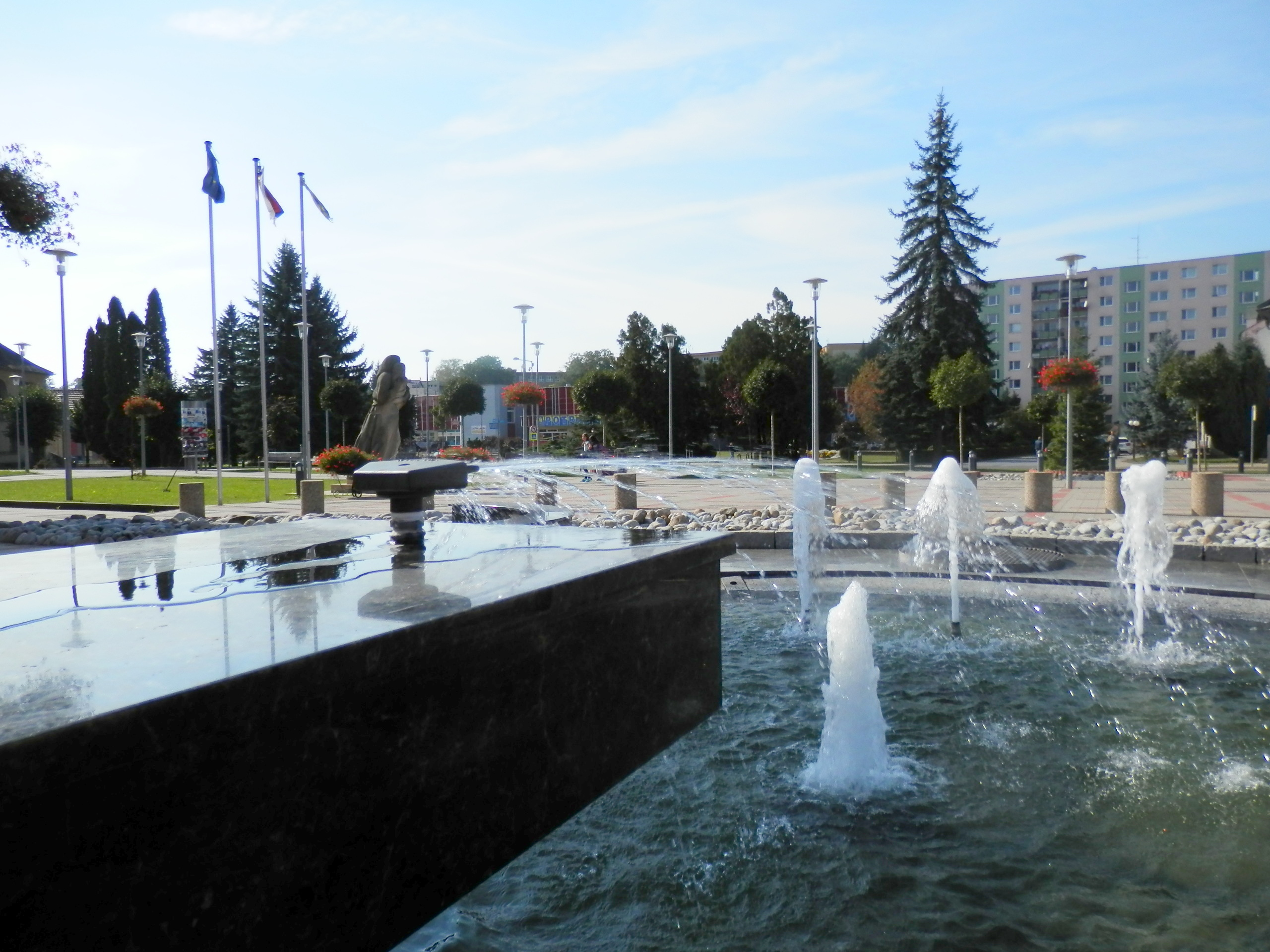 Pamätník obetiam a účastníkom Druhej svetovej vojny z Giraltoviec. Pieskovcová socha - Matka s dieťaťom- doba vzniku rok 1991. Autor sochy: Tibor Bártfay. Mesto Giraltovce okres Svidník.